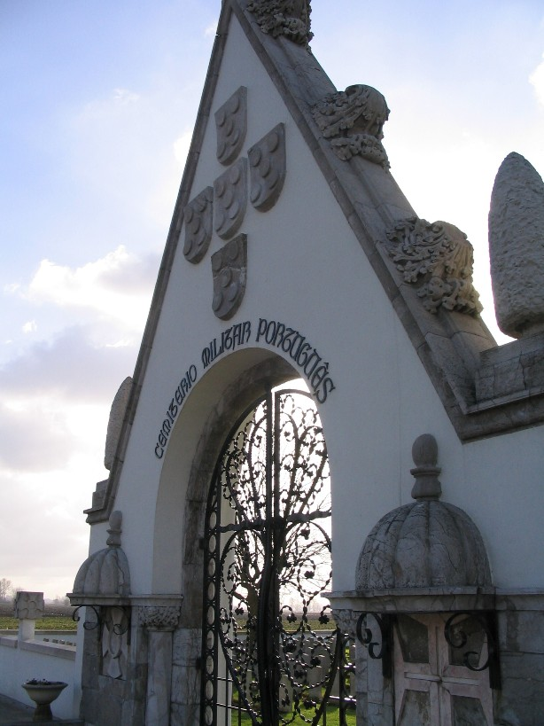 Cimetière portugais de Richebourg